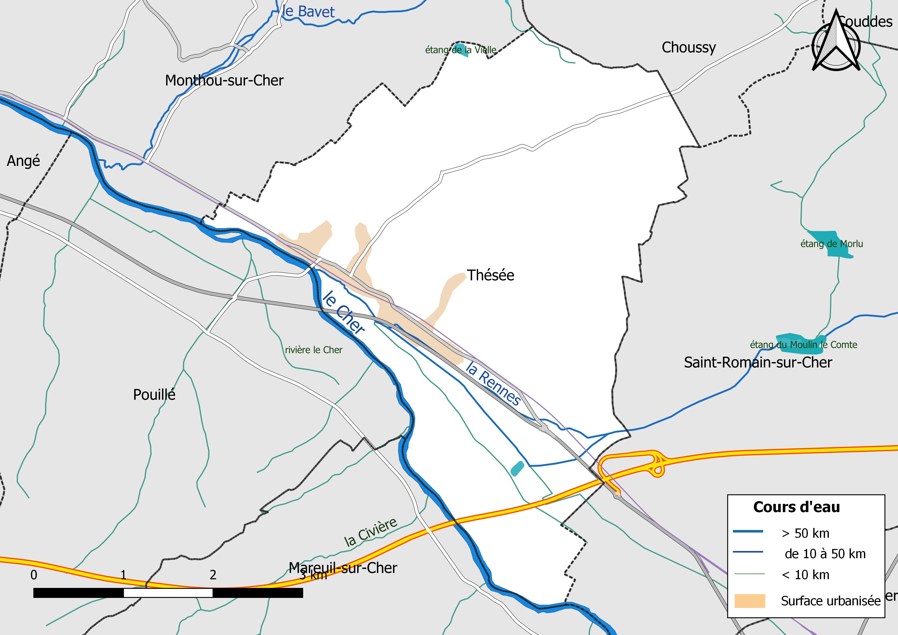 Carte du réseau hydrographique de la commune de Thésée (Loir-et-Cher), France.